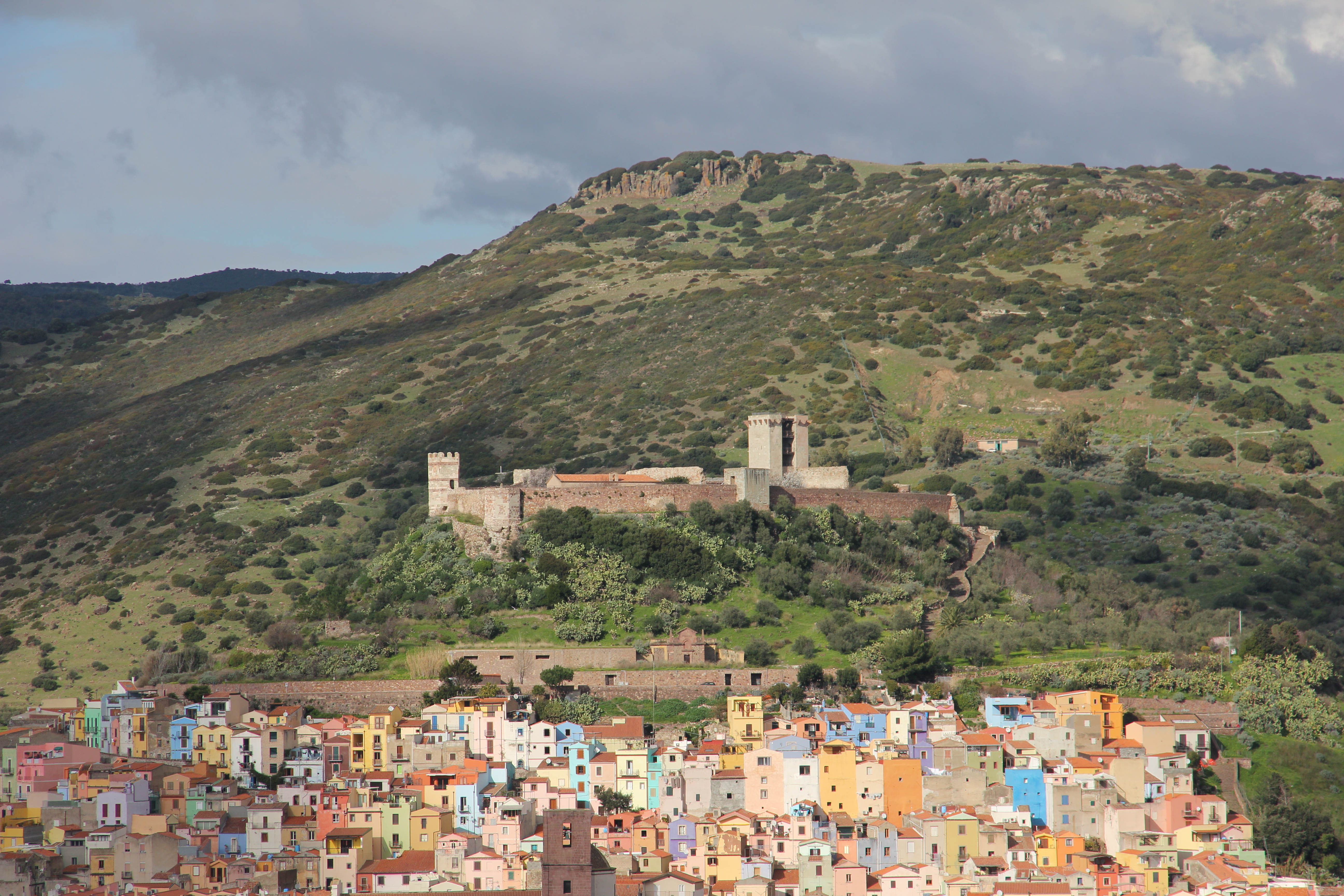 Bosa - Castello Malaspina